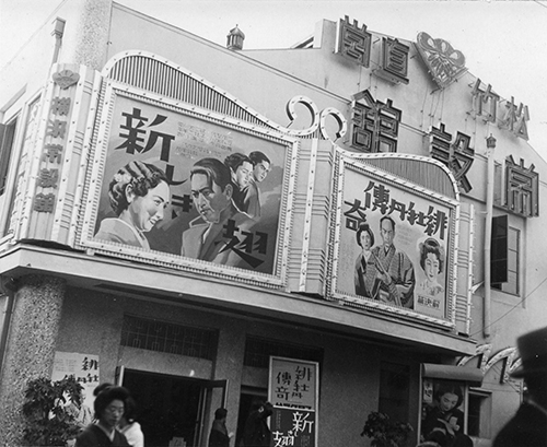 横浜市の横浜常設館。1910年開館。